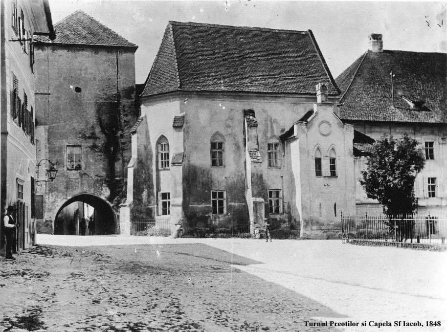 Capela Sf. Iacob și Turnul preoților. Nu mai există în prezent